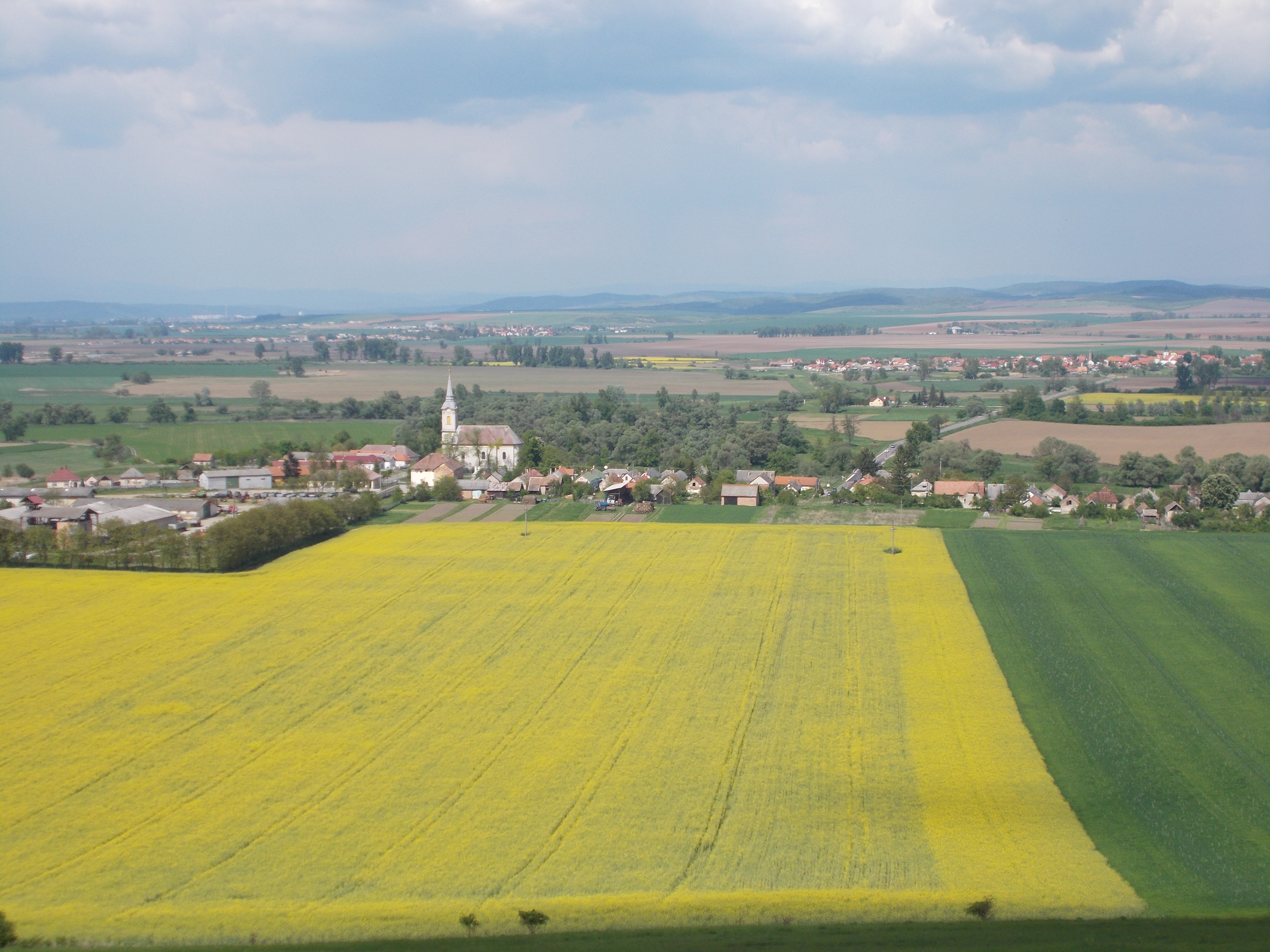 Sajópüspöki látképe